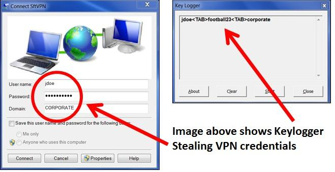 Slika kaže, kako naložen beležnik tipkanja beleži uporabnikove zaupne informacije.